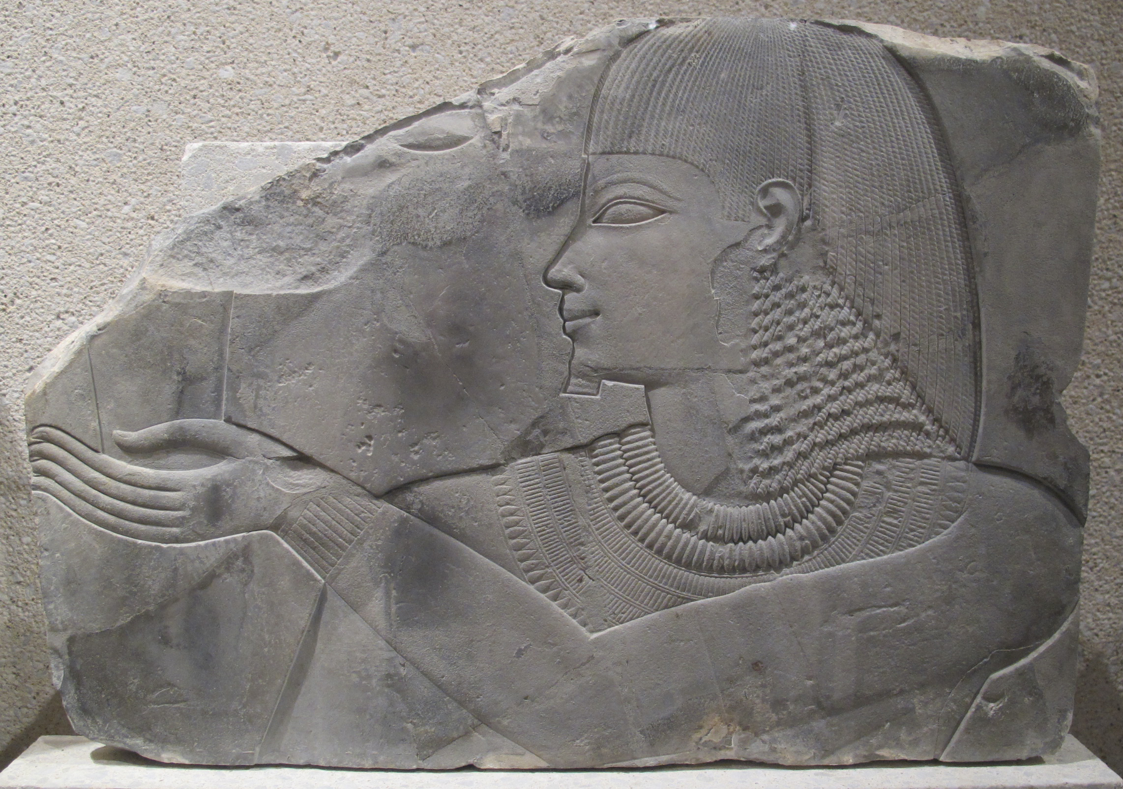 Copia di un rilievo dalla tomba di chaemhat